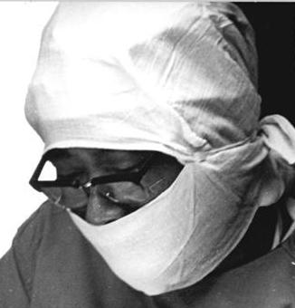 Leipzig, Universitätsklinik, Herzoperation Zentralbild Deutsche Demokratische Republik 26.10.1970 Universitätsklinik für Herz- und Gefäßchirurgie in Leipzig "Bitte Ruhe - Herzoperation" Fachliches Wissen, Präzision und Konzentration - drei unerläßliche Eigenschaften für eine Herzoperation. Mitte: Prof. Ton That Tung, rechts: Prof. Martin Herbst. Reporter: Sturm (Bitte beachten Sie unseren Begleittext)